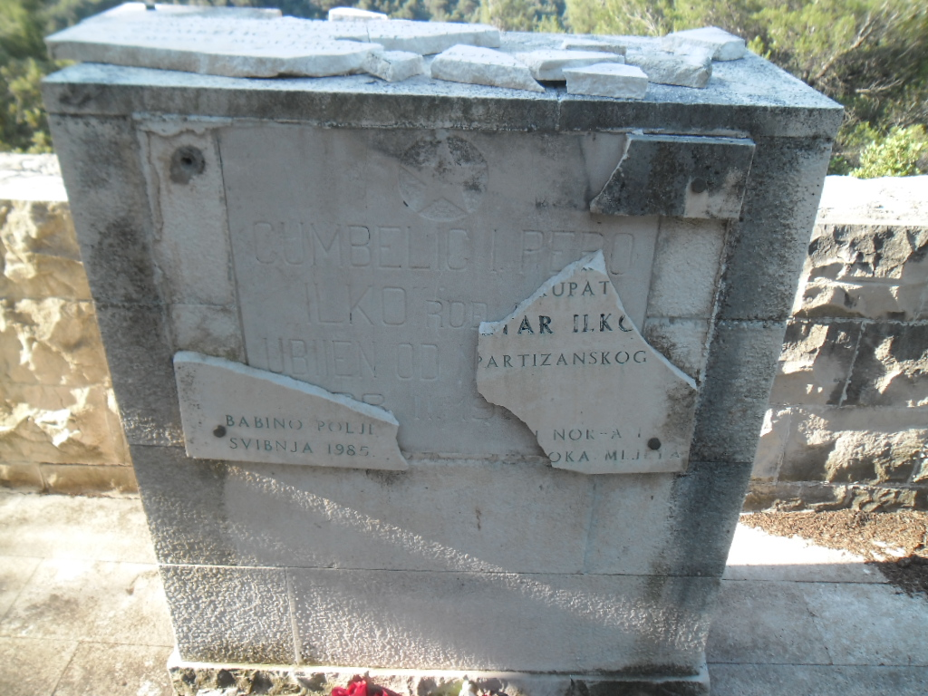 partizanski spomenik na otoku Mljetu